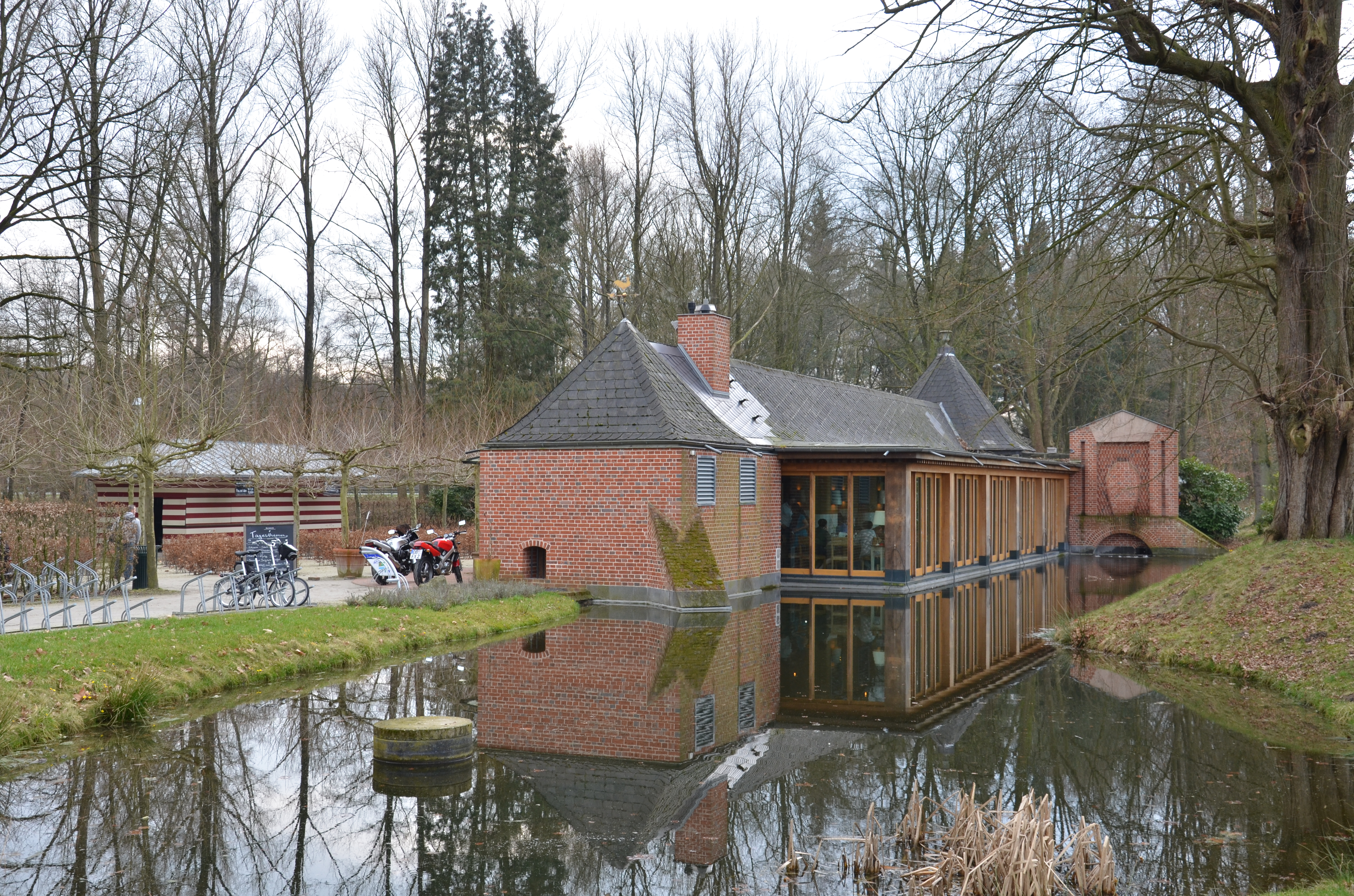 Wasserschloss Gartrop in Hünxer Ortsteil Gartrop-Bühl Landgasthof Blumrath am Mühlteich